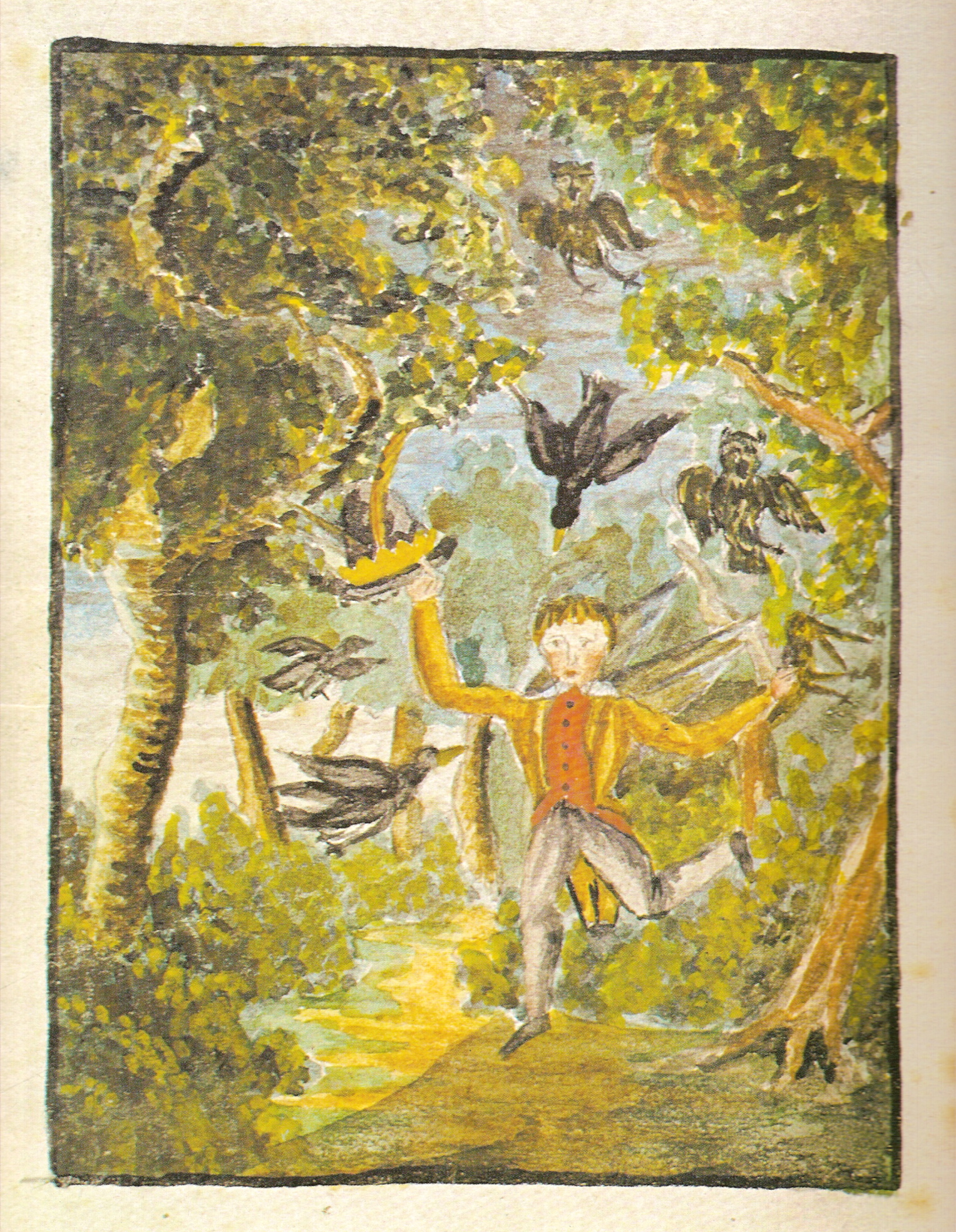 drawn by G. Keller aged ten